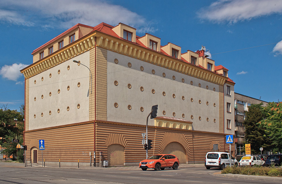 Schron przy ul. Grabiszyńskiej/Stalowej we Wroclawiu